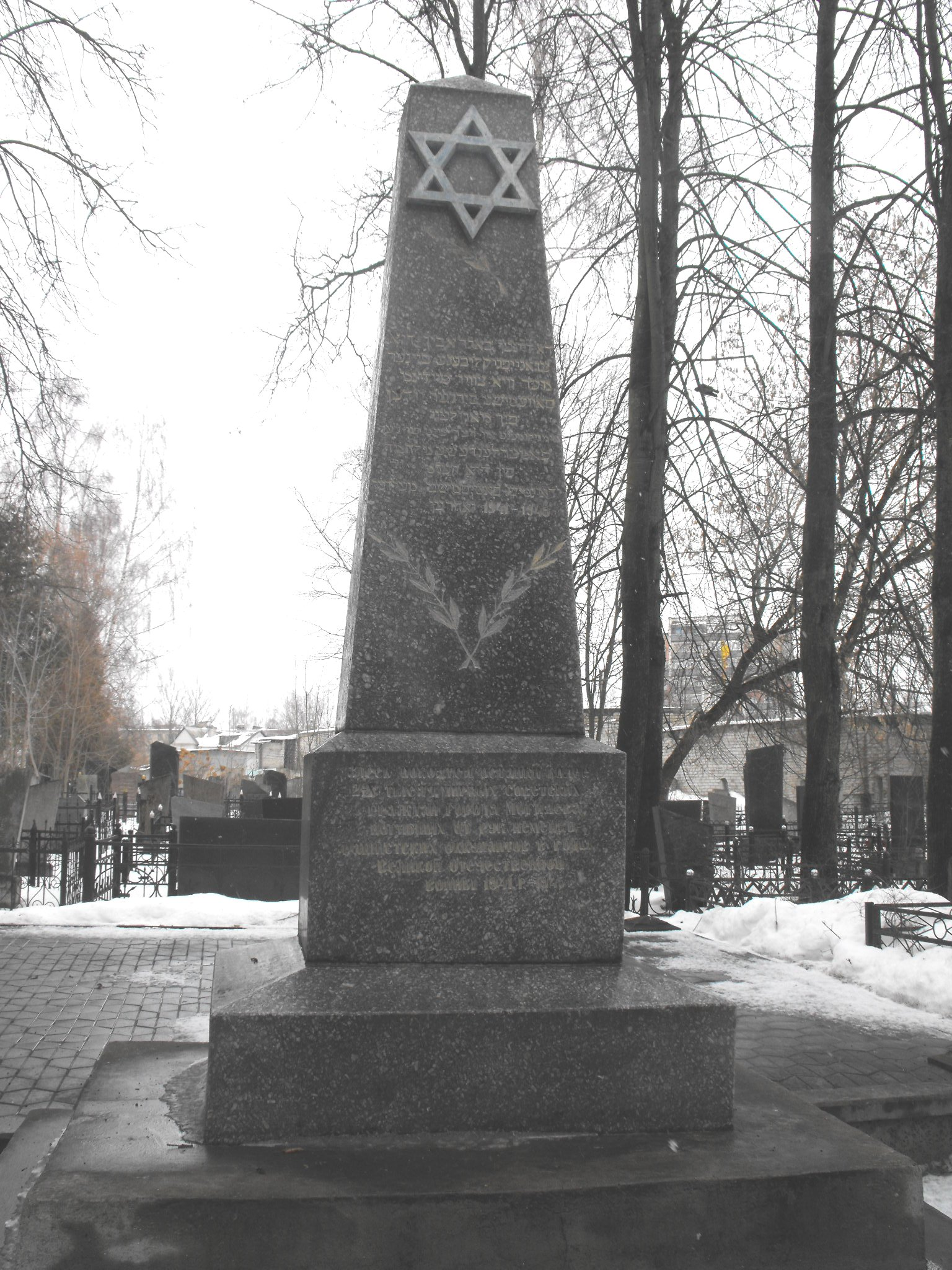 Памятник, возведенный на Машековском еврейском кладбище в память о более чем 2 000 убитых евреях Могилевского гетто.